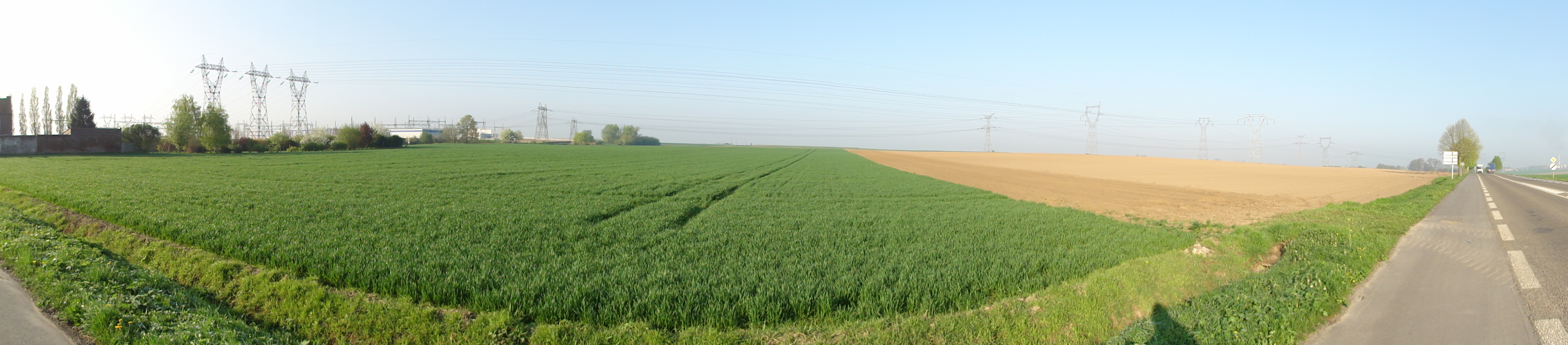 La Fosse de Mastaing de la Compagnie des mines d'Aniche était un charbonnage constitué d'un seul puits situé à Mastaing, Nord, Nord-Pas-de-Calais, France.